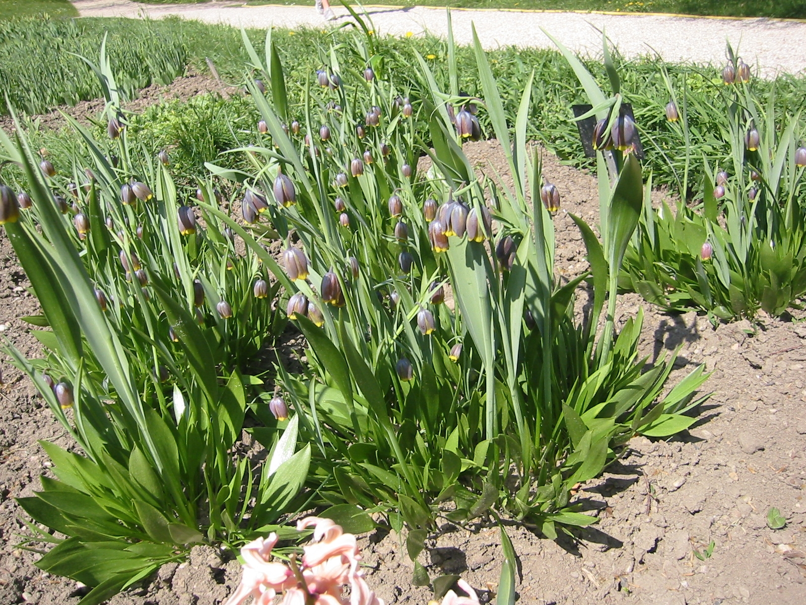 Fritillaria uva-vulpis; Botanic Garden, Vienna, Austria.